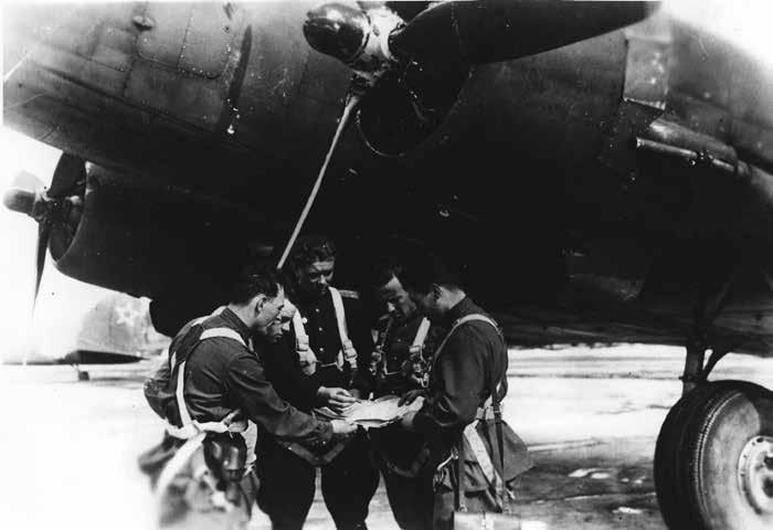 Viktor Arturovič Filonov (první zleva), kapitán letadla Dougles C-47, které vysadilo parašutisty z operace Jan Kozina